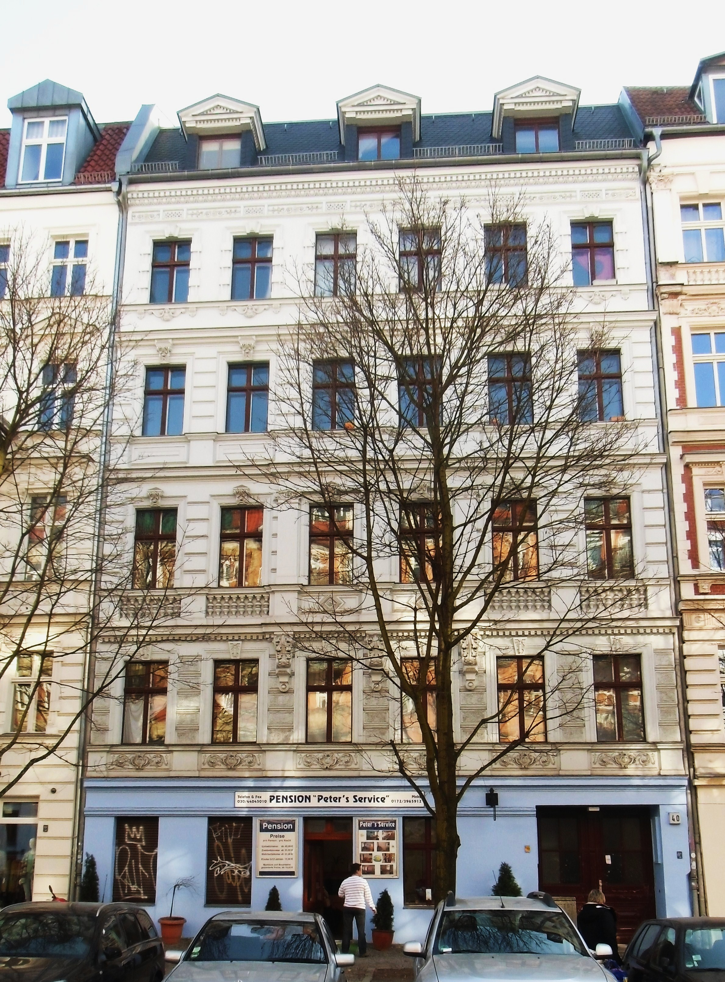 Denkmalgeschütztes Wohnhaus, erbaut um 1880